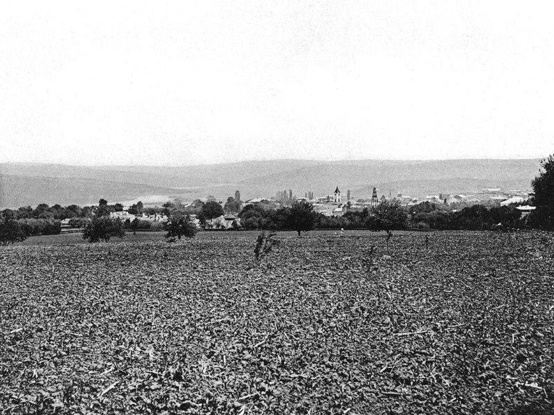 Fălticeni